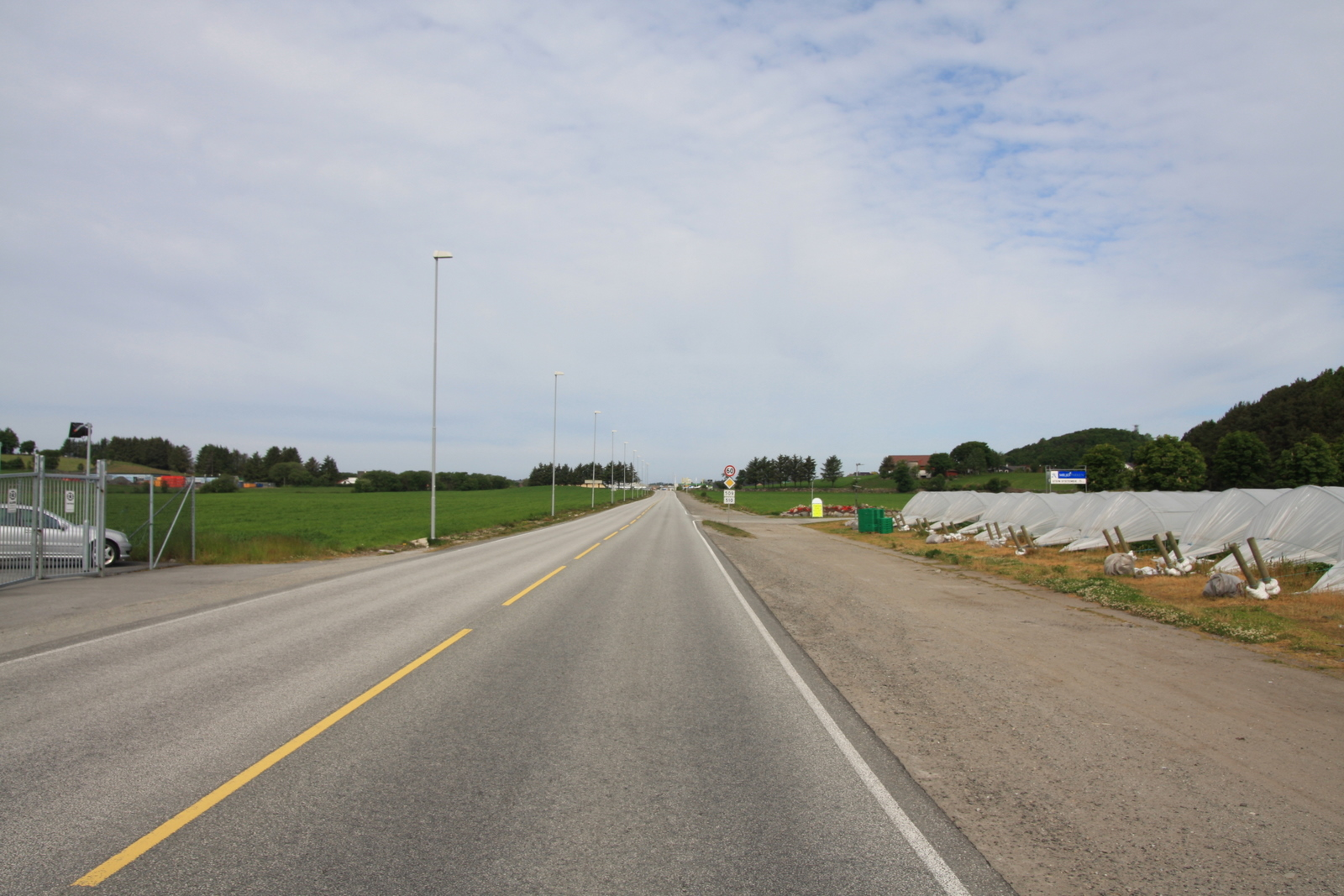 Fylkesvei 443 Forusbeen